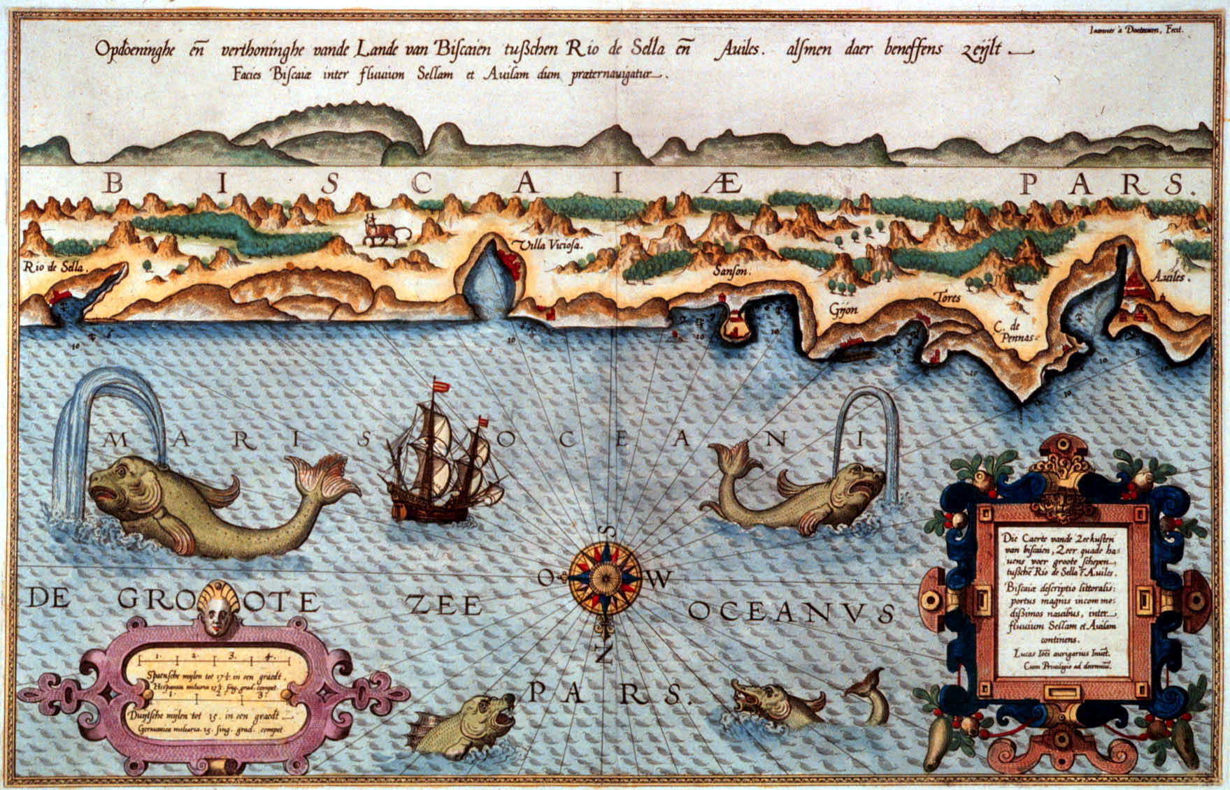 Die Carte vande Zeekusten van biscaien, zeer guade havens voer groote schepen tussche Rio de Selle e Auiles. Biscanae descriptio littoralis: portus magnis incommodissimos nauibus, inter fluuium sellam et Auilam continens. uit: Speculum nauticum super nauigatione maris Occidentalis confectum . . ., Spieghel der Zeevaerdt, vande nauigatie der Westersche zee Innehoudende alle de Custen van Franckrijck etc. Size:33 x 51 cm.